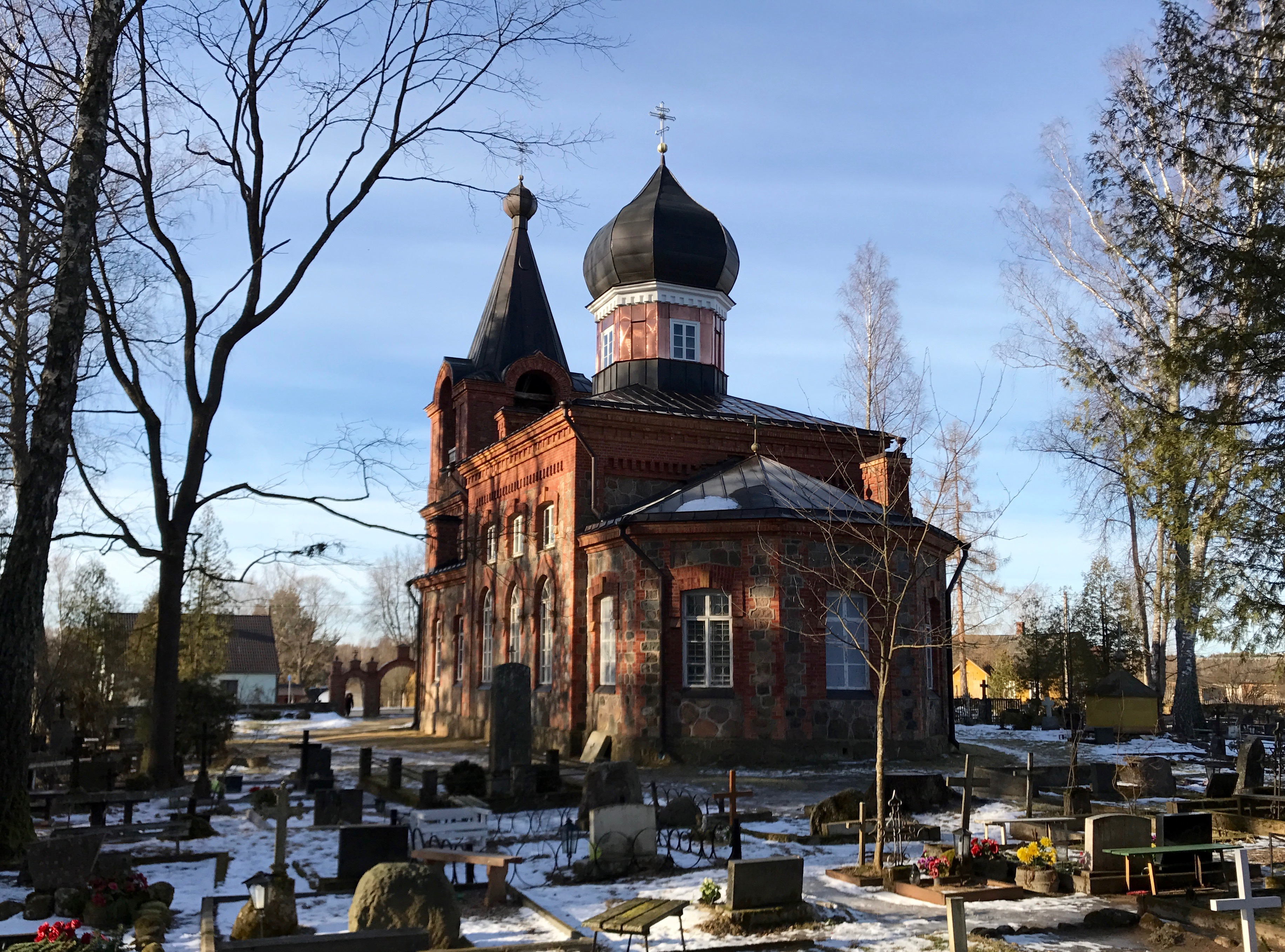 Värska Püha Georgiuse kirik (2017)